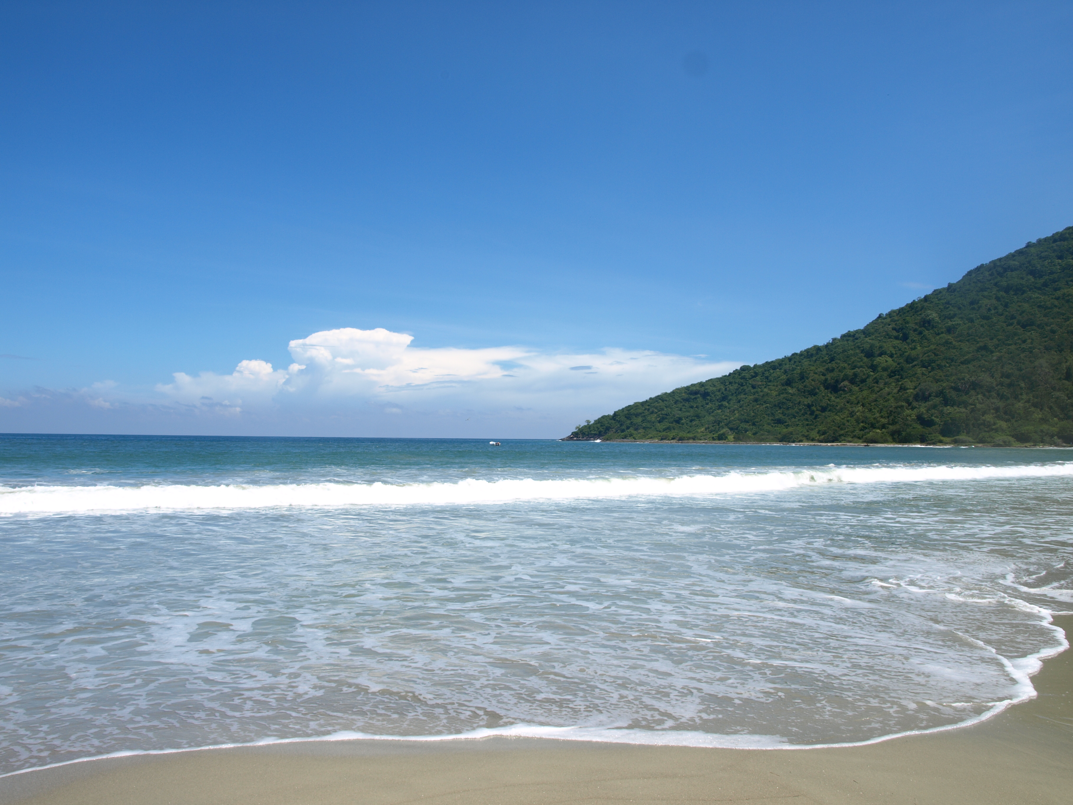 LO SUBLIME DE UNA HERMOSA BAHÍA.